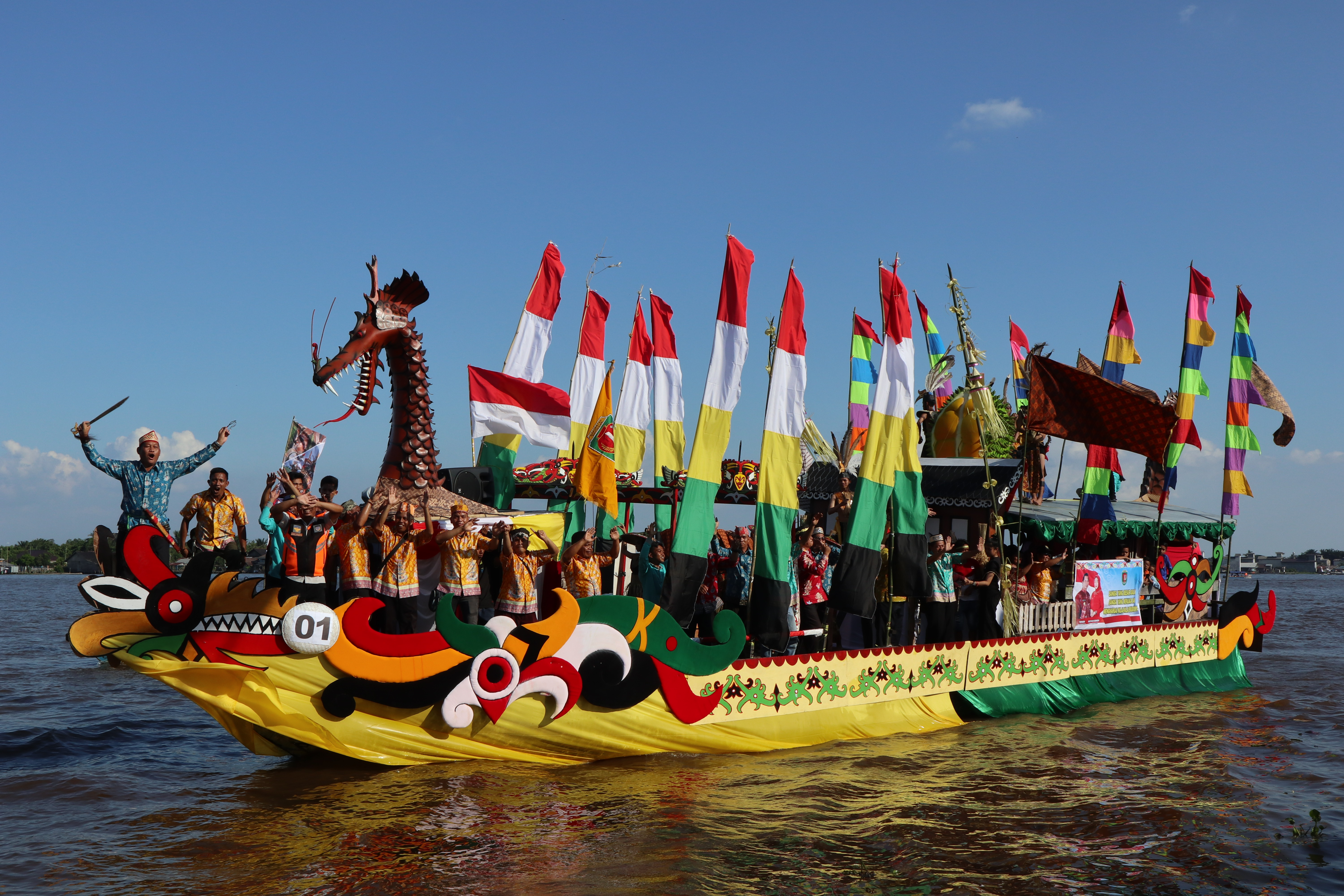 Salah satu peserta lomba jukung hias dalam Festival Budaya Isen Mulang 2018 di Kuala Kapuas.